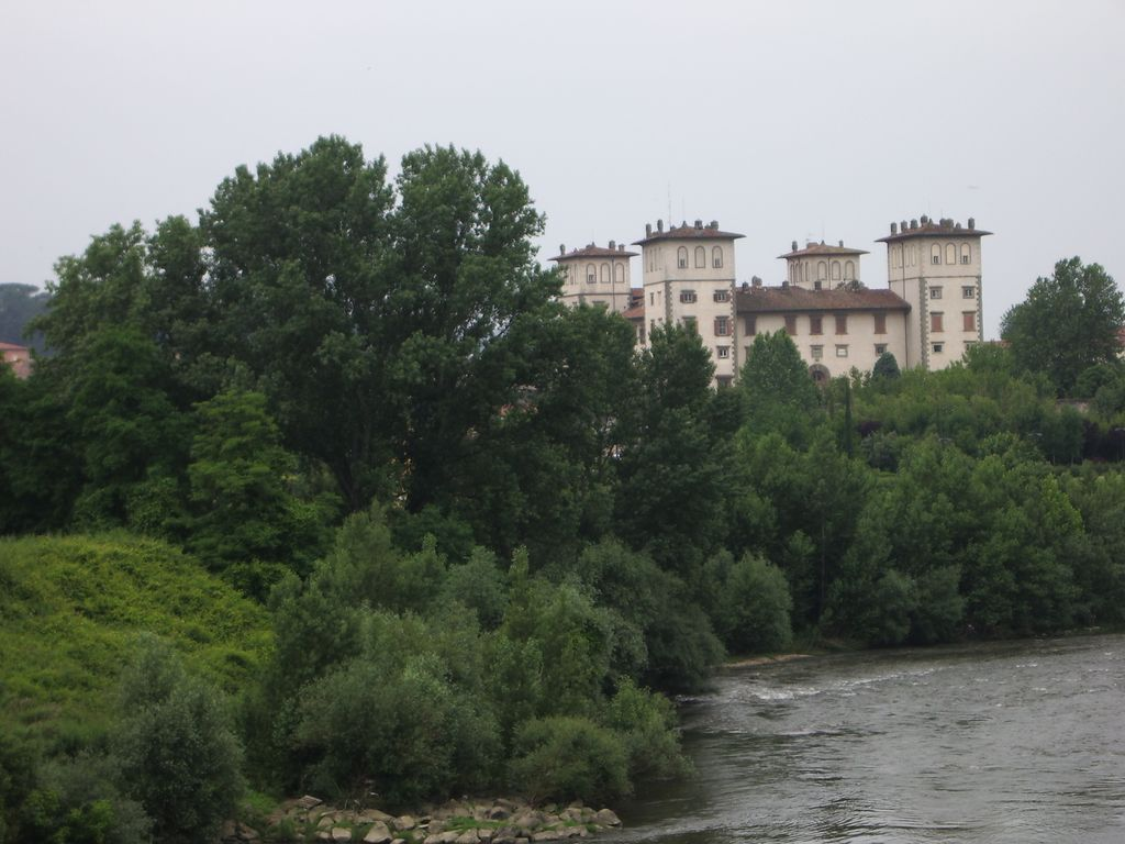 Montelupo Fiorentino - villa medicea e fiume Arno